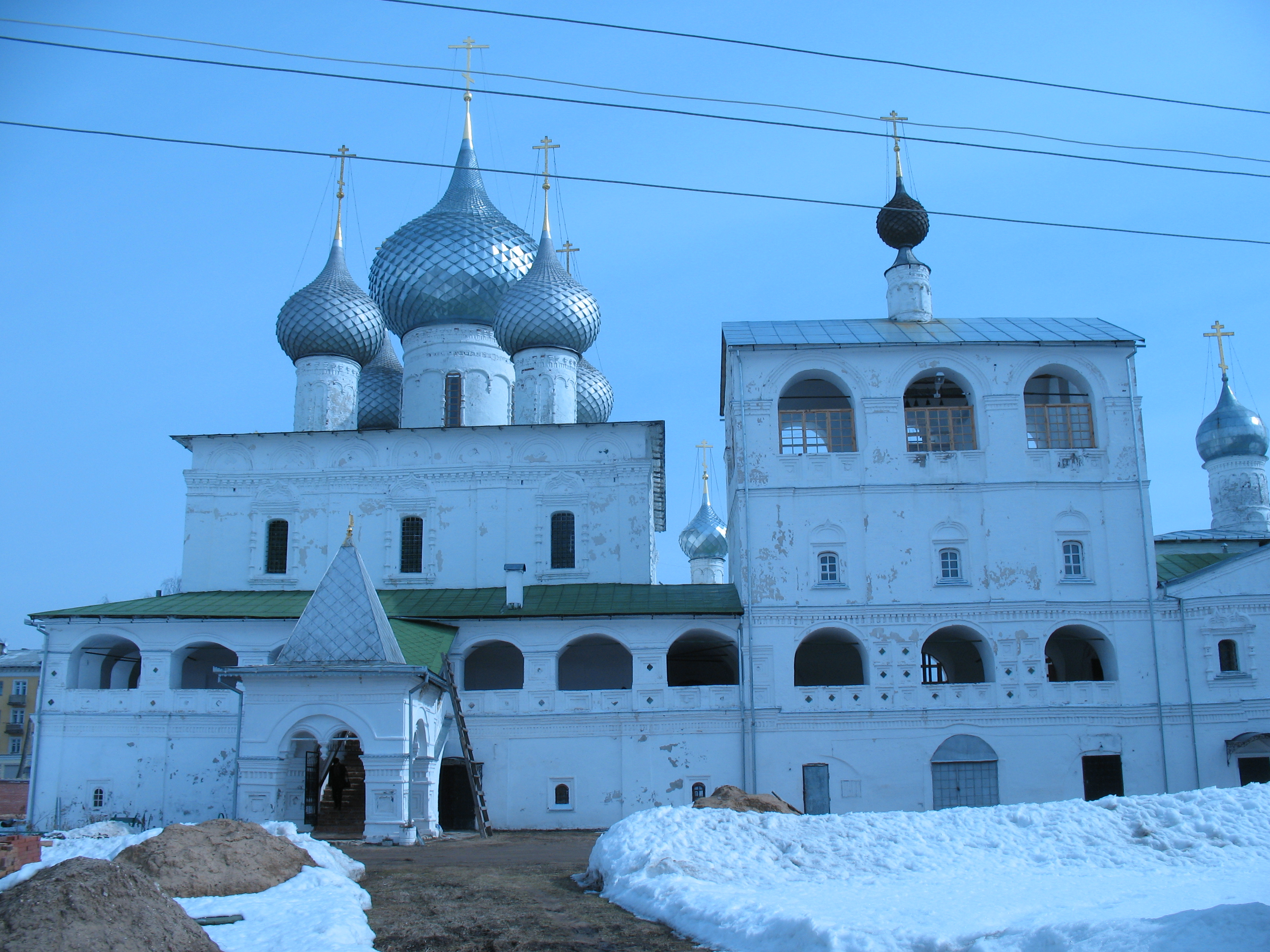 Воскресенский Мужской монастырь г. Углич